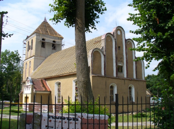 Rydzewo